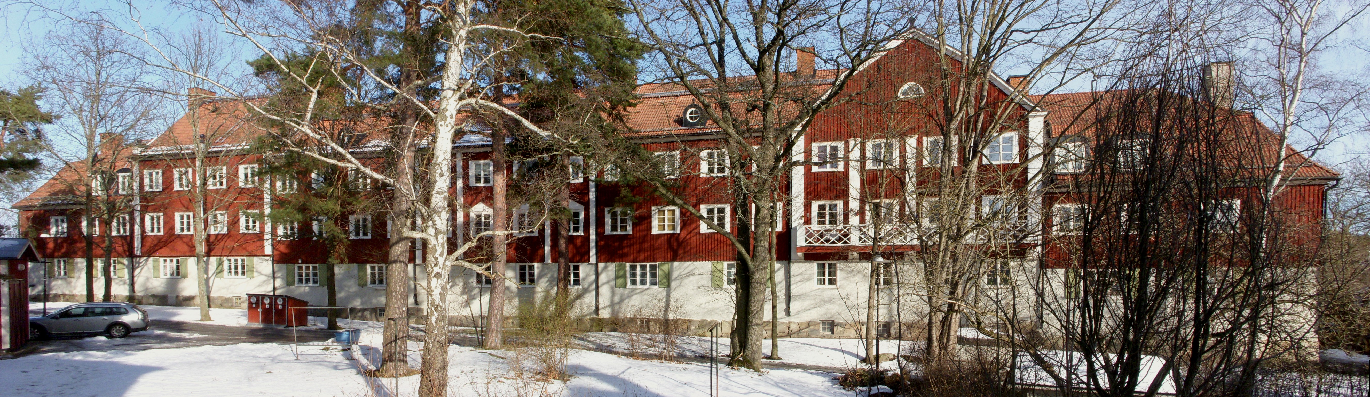 Bostadshuset i kvarteret Bergsryggen vid Ulvsundavägen